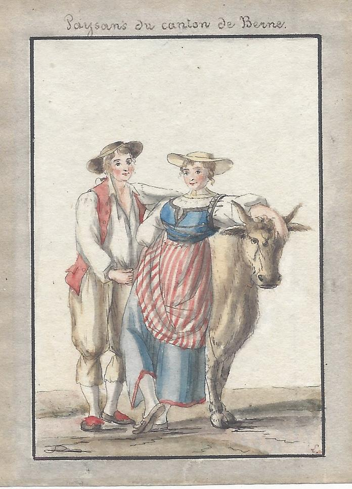 Gottfried Locher: Paysans du canton de Berne, aquarellierte Miniaturfederzeichnung 7,1 x 4,9 cm, rechts unten signiert: L., um 1790. Der verdrehte Fuß gibt der Darstellung eine spöttische Wendung.